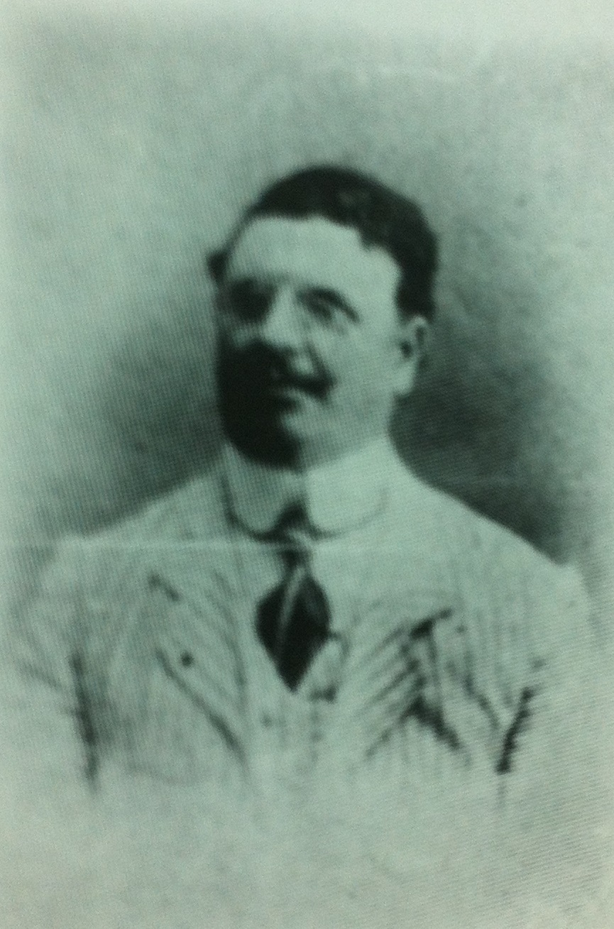 Jacob Ha-Cohen (1872-1914), a Jewish-Tunisian writer, journalist, poet and a musician.